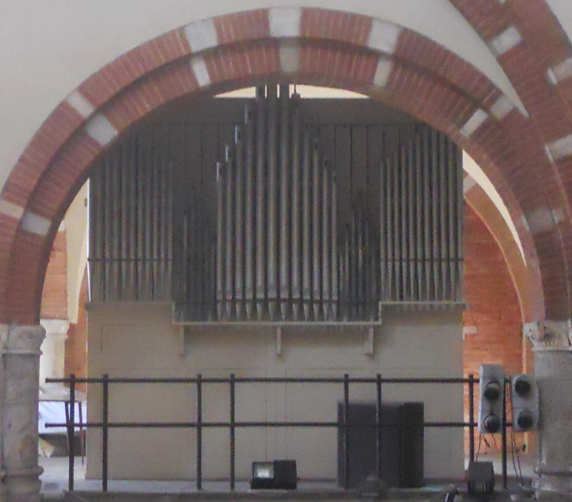 L'Espressivo (III tastiera) dell'organo Balbiani della Basilica di Sant'Ambrogio a Milano